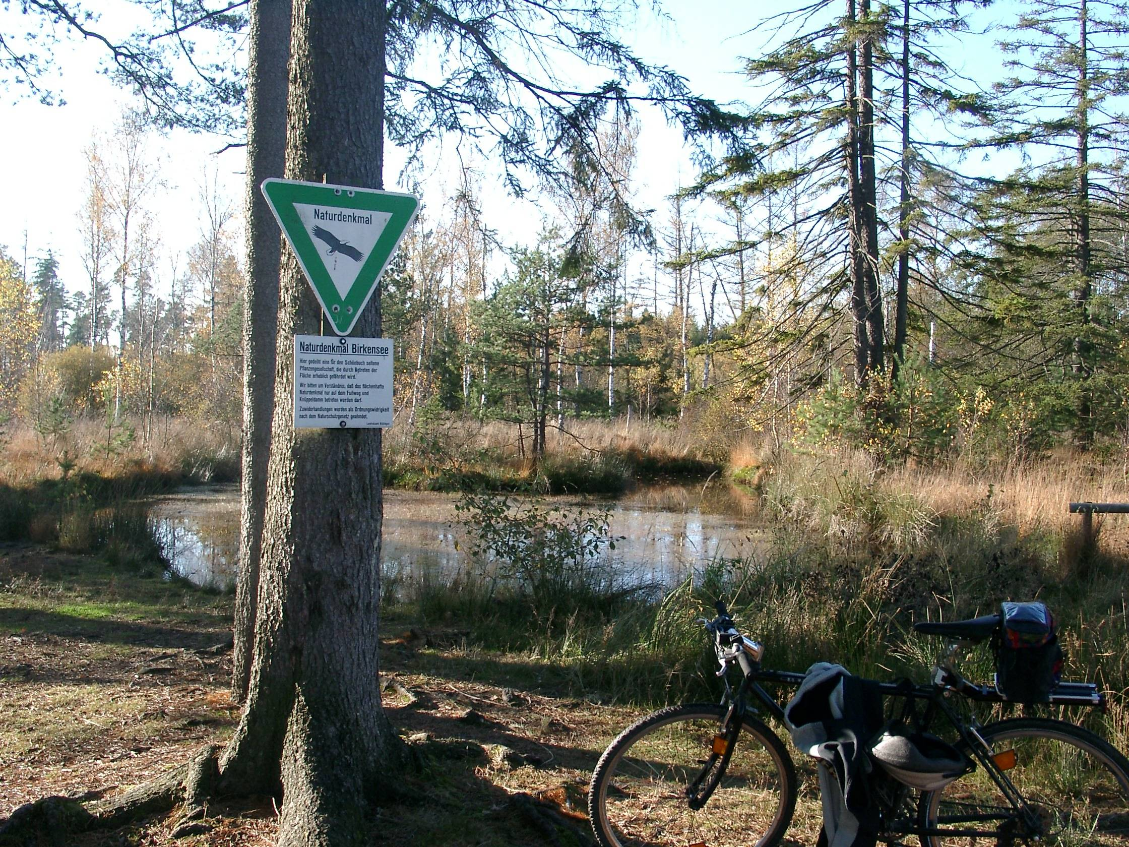 Birkensee im Schönbuch, Schild Naturdenkmal